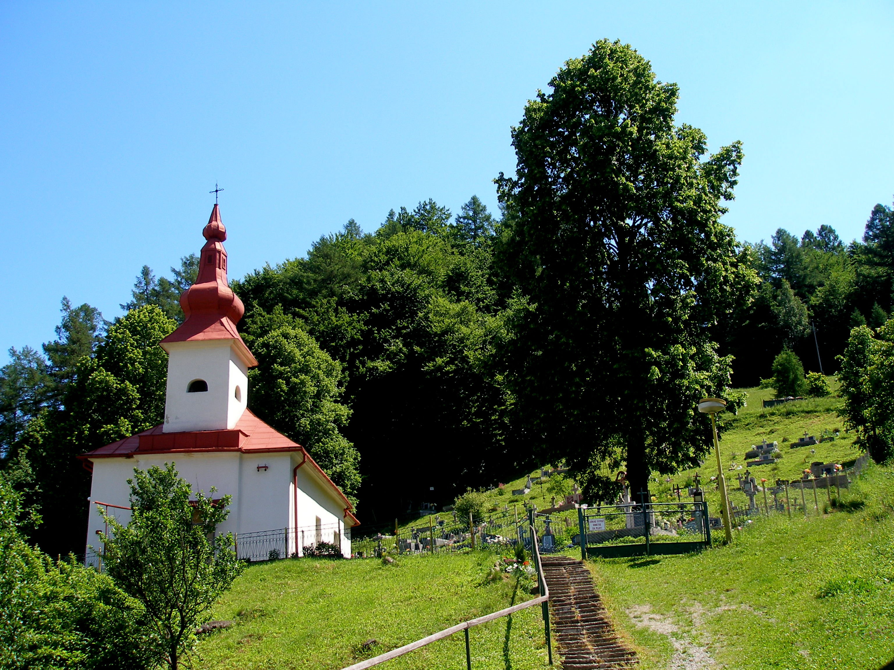 Obec Renčišov okres Sabinov